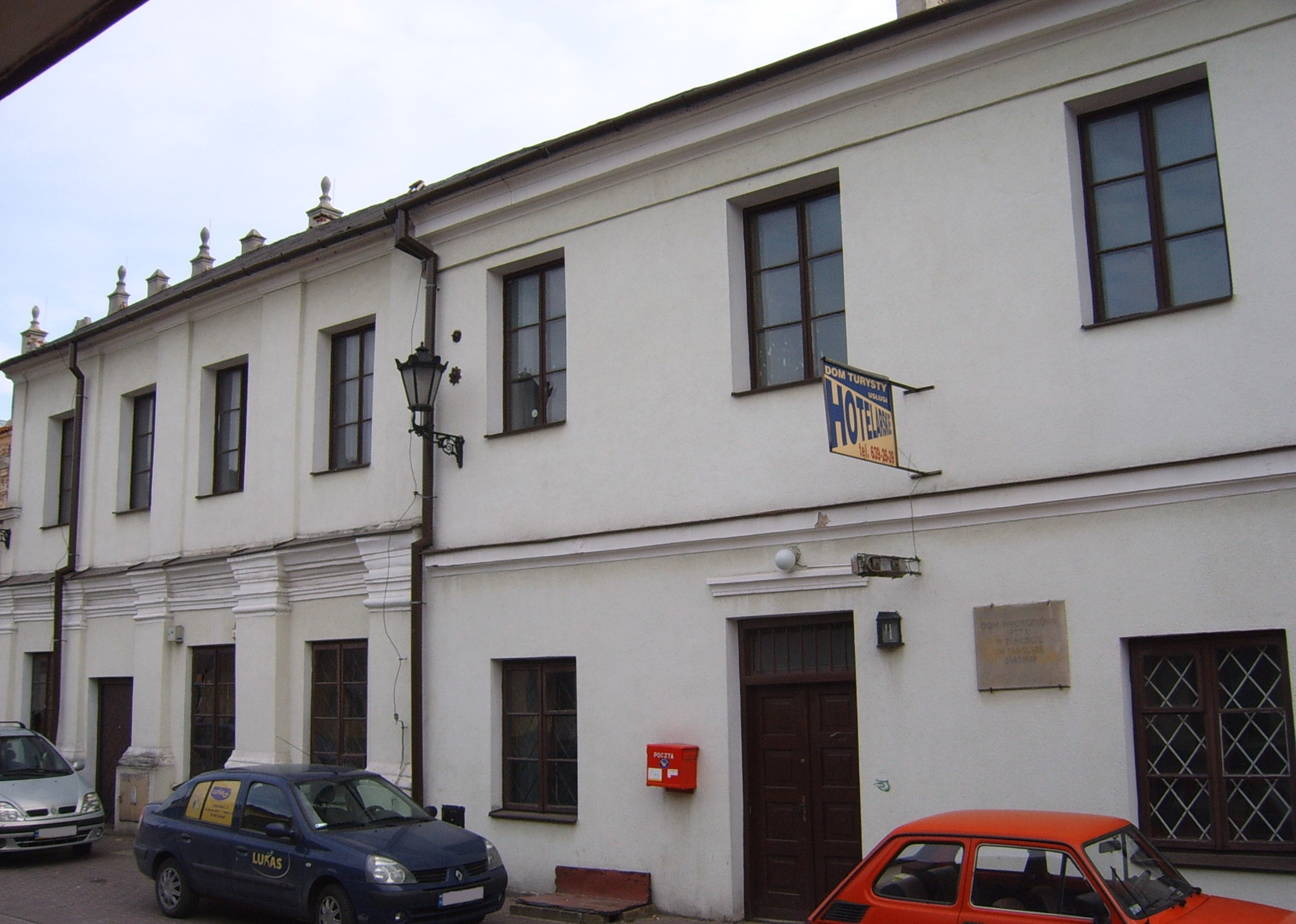 Dom Turysty, Stare Miasto w Zamościu; dawny dom kahalny (ul. Zamenhofa)